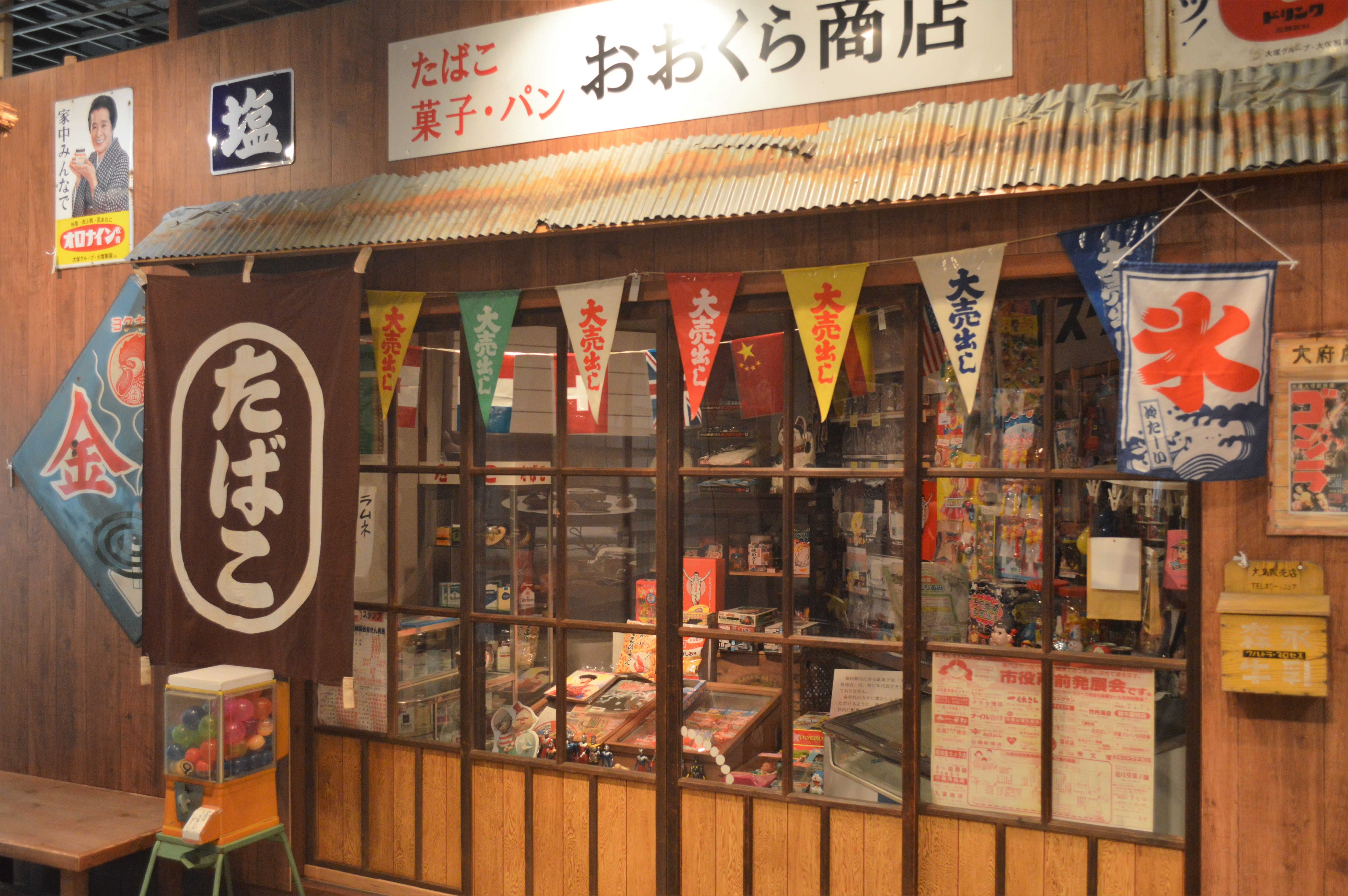 愛知県大府市の大倉会館にある大府市歴史民俗資料館。常設展示。